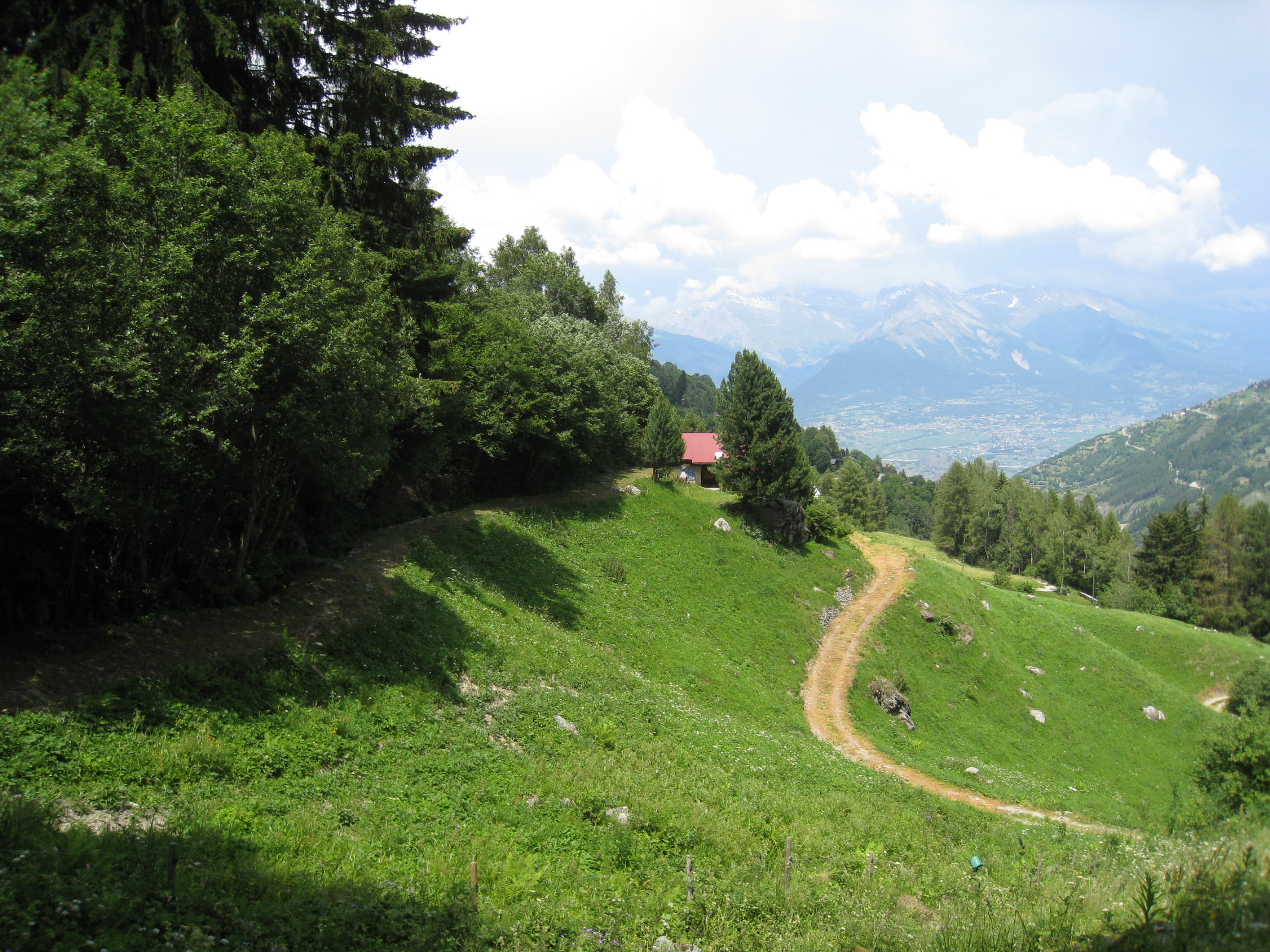 Vue sur le Val de Nendaz, depuis le Bisse d'En Bas